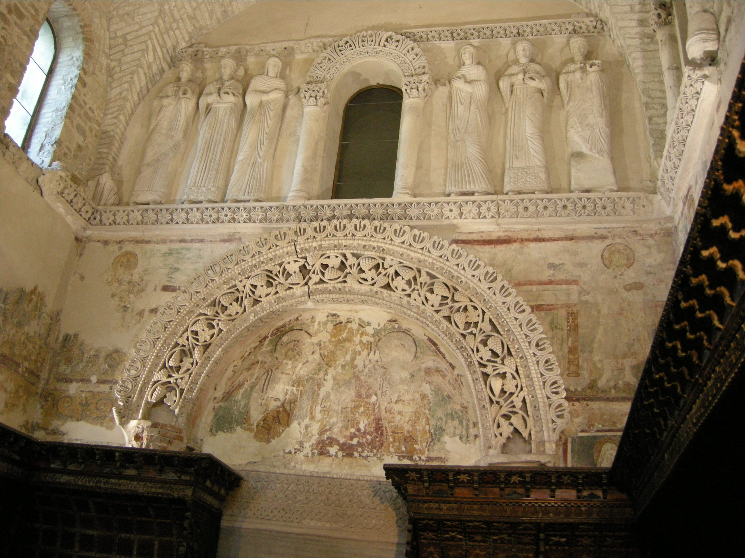 Cividale, tempietto longobardo 03.1